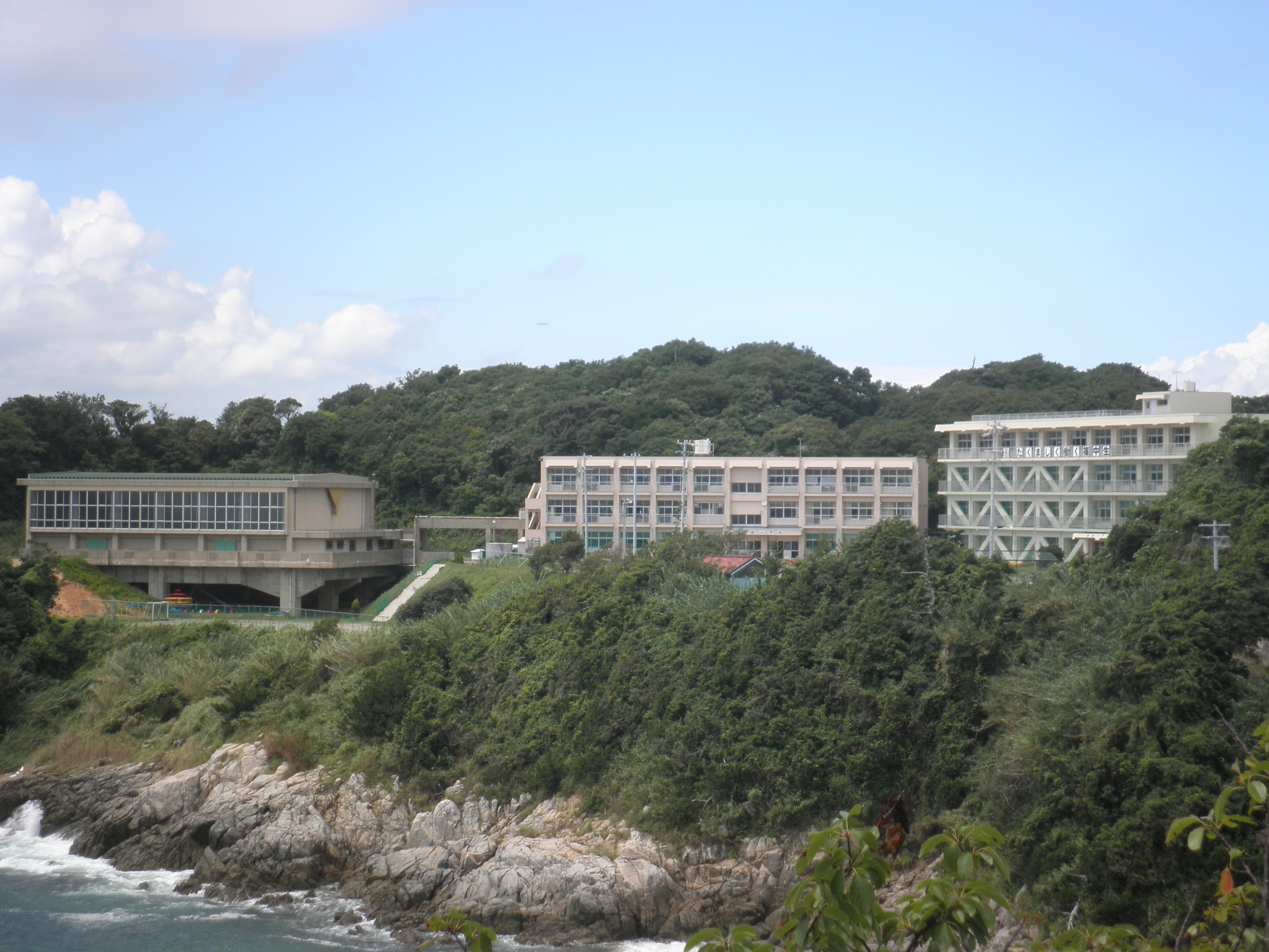 愛知県南知多町の篠島にある篠島小中学校